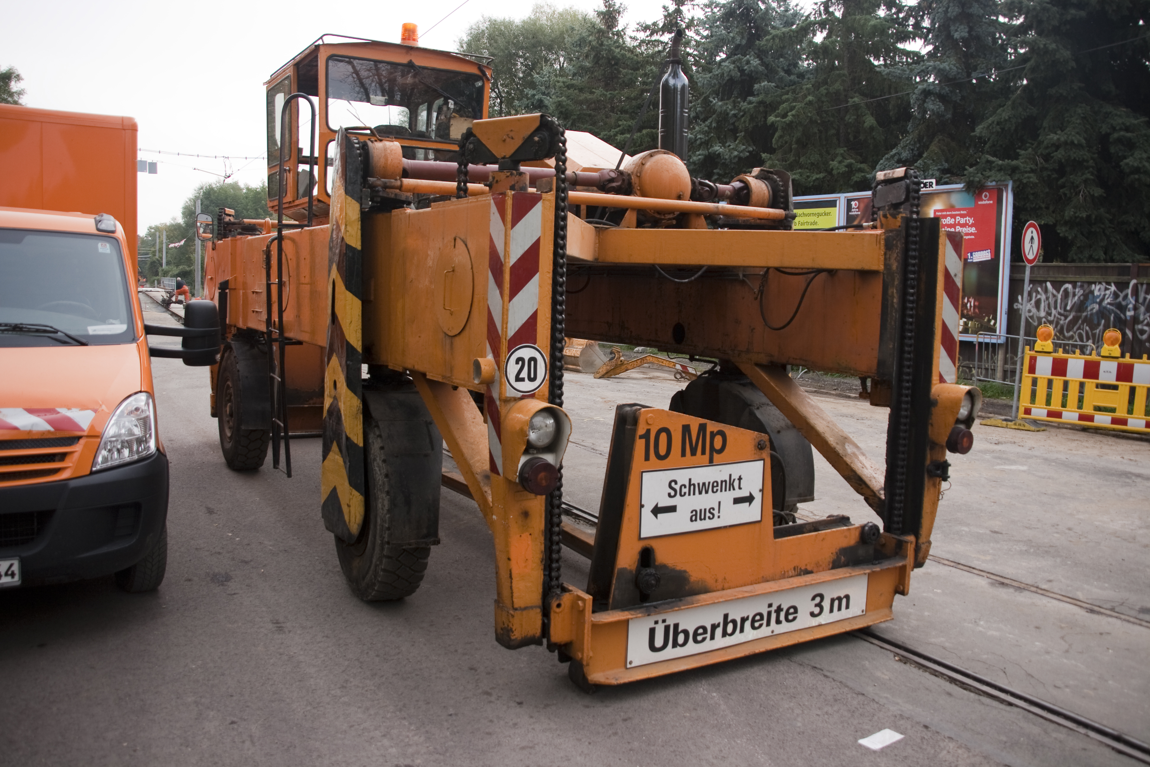 VALMET Torlader - Großverbundplattentransport und Montagegerät